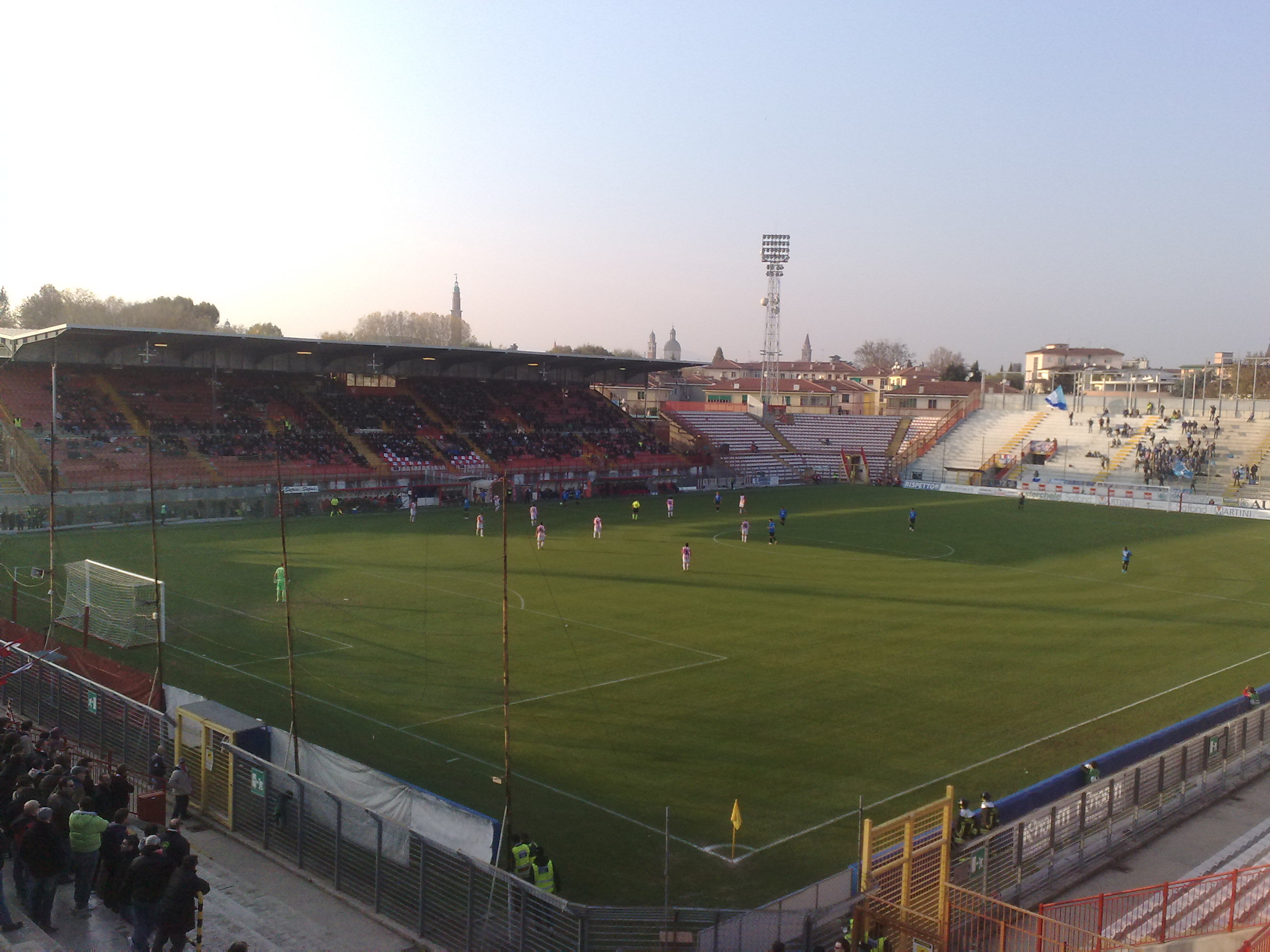 Il campo visto dalla sud